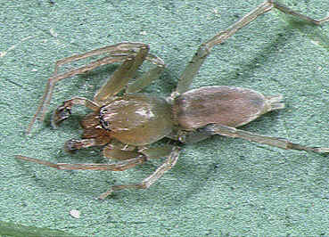 male Clubiona viridula from Okinawa.